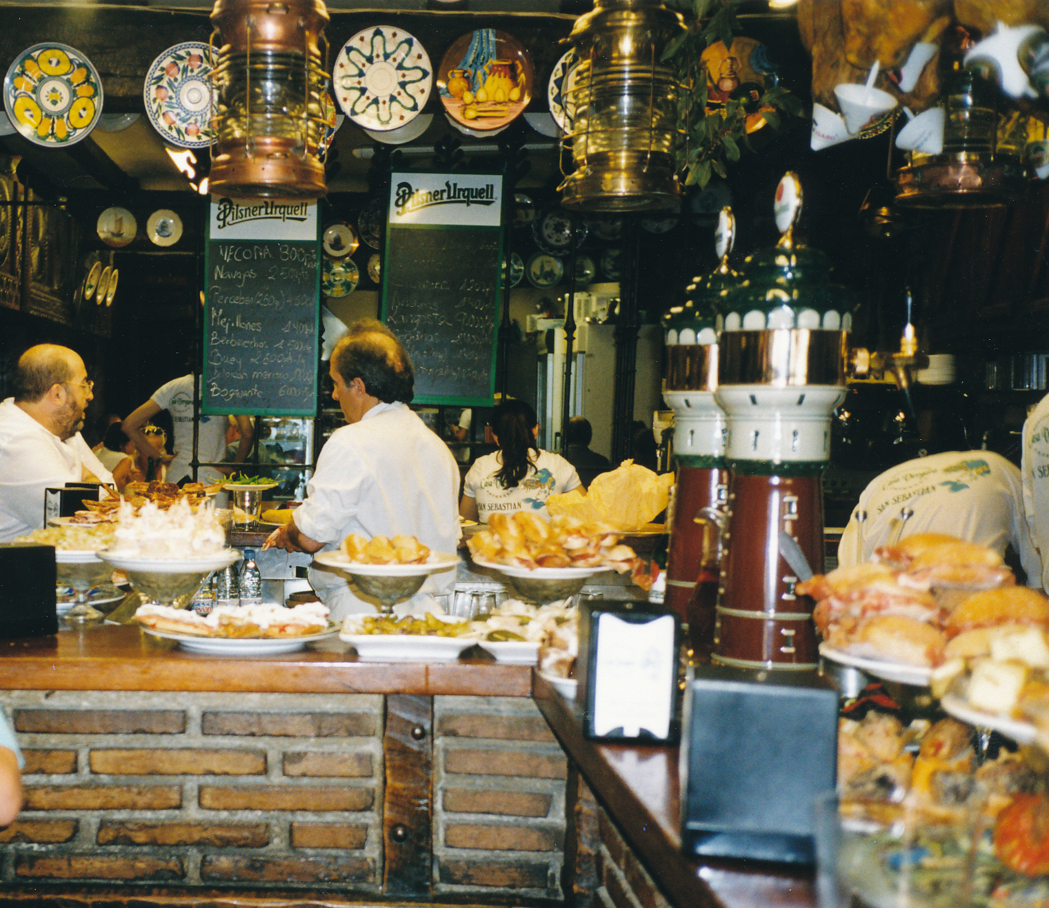 San Sebastian (Donostia) - (herrliche) Pincho-Bar in der Altstadt Datum: 06/1999 Urheber: Michael Pfeiffer Quelle: privates Fotoalbum des Urhebers